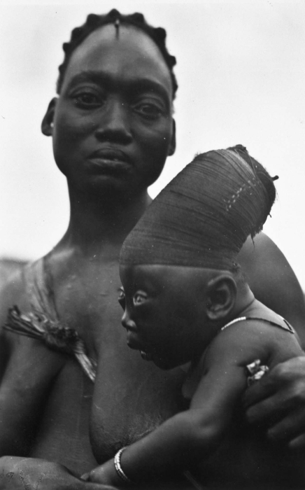 Het hebben van een langgerekt achterhoofd gold als een van de vrouwelijke schoonheidsidealen bij de Mangbetu. Deze schedeldeformatie werd bereikt door het hoofd van baby's al vanaf de geboorte stevig in te wikkelen.